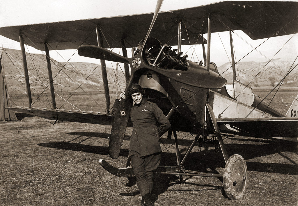 Armstrong-Whitworth FK3, Baunummer 6219. Der junge Pilot, 2nd Lt AC Stopher, landete irrtümlich auf dem bulgarischen Flugplatz Belitza , Thessaloniki-Front 1917